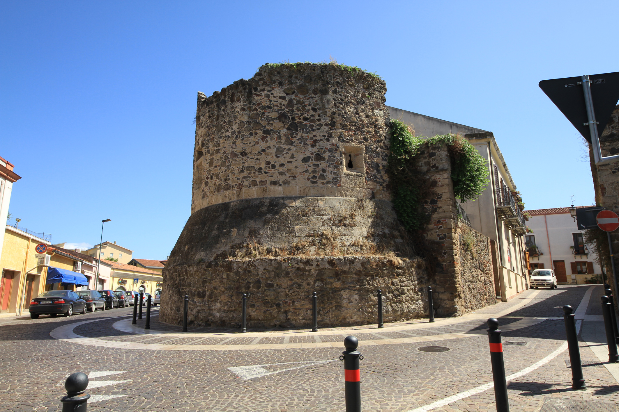 Mura midievali di Oristano